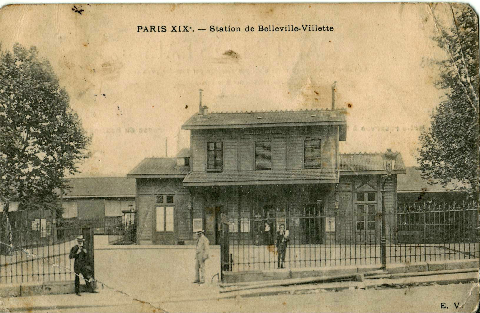 Carte postale ancienne éditée par E. V. : PARIS XIX - Station de Belleville-Villette